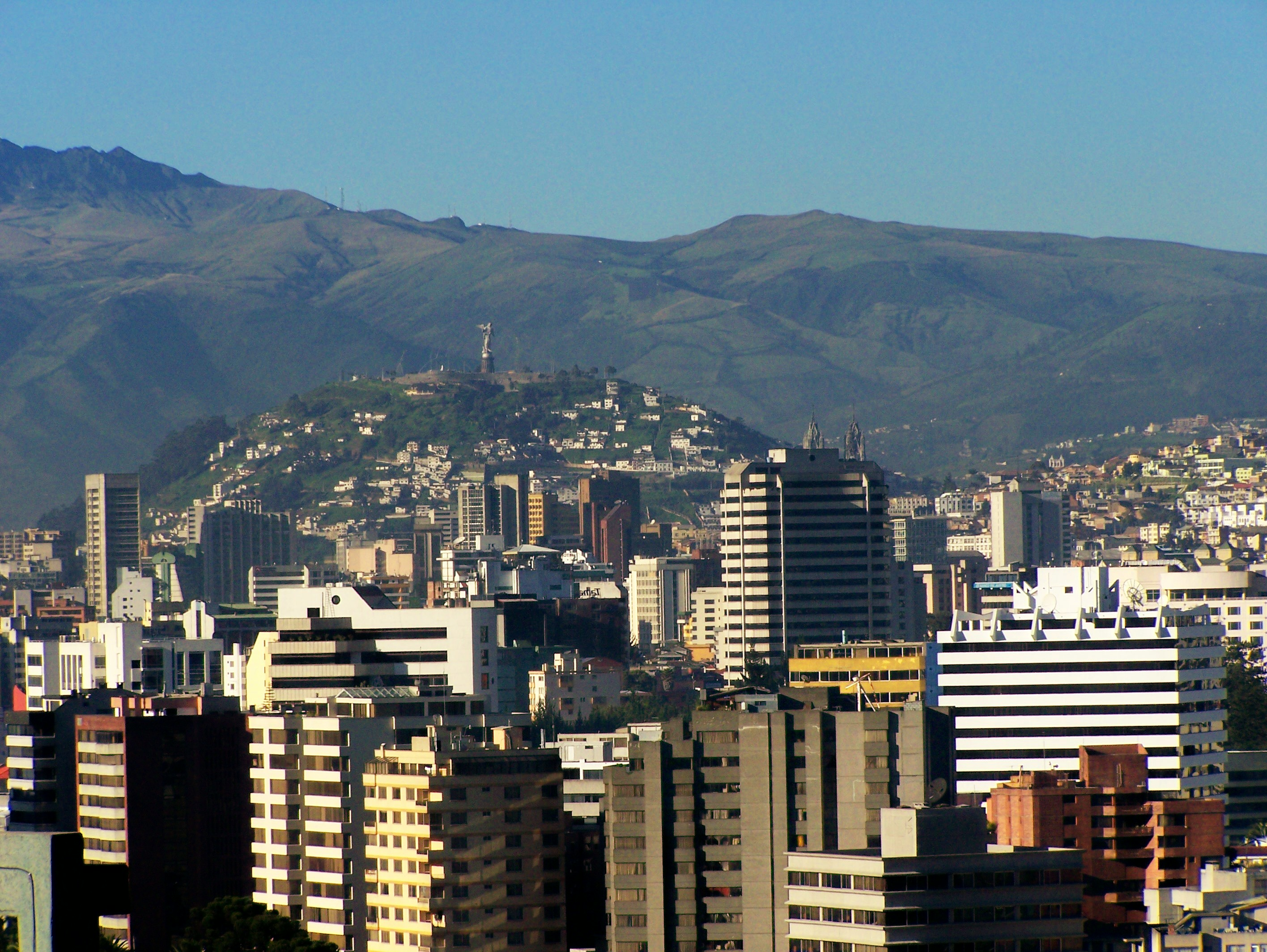 Quito (panorámica desde el nororiente con montañas y páramos al fondo)